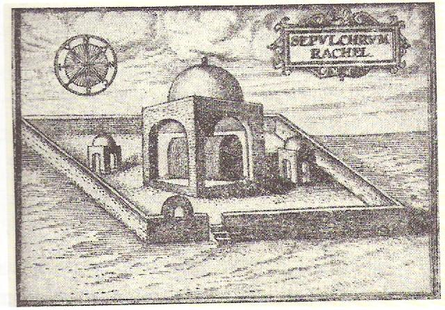 ציור של he:קבר רחל משנת 1585 מתוך ספרו של התייר הנוצרי זואלרט